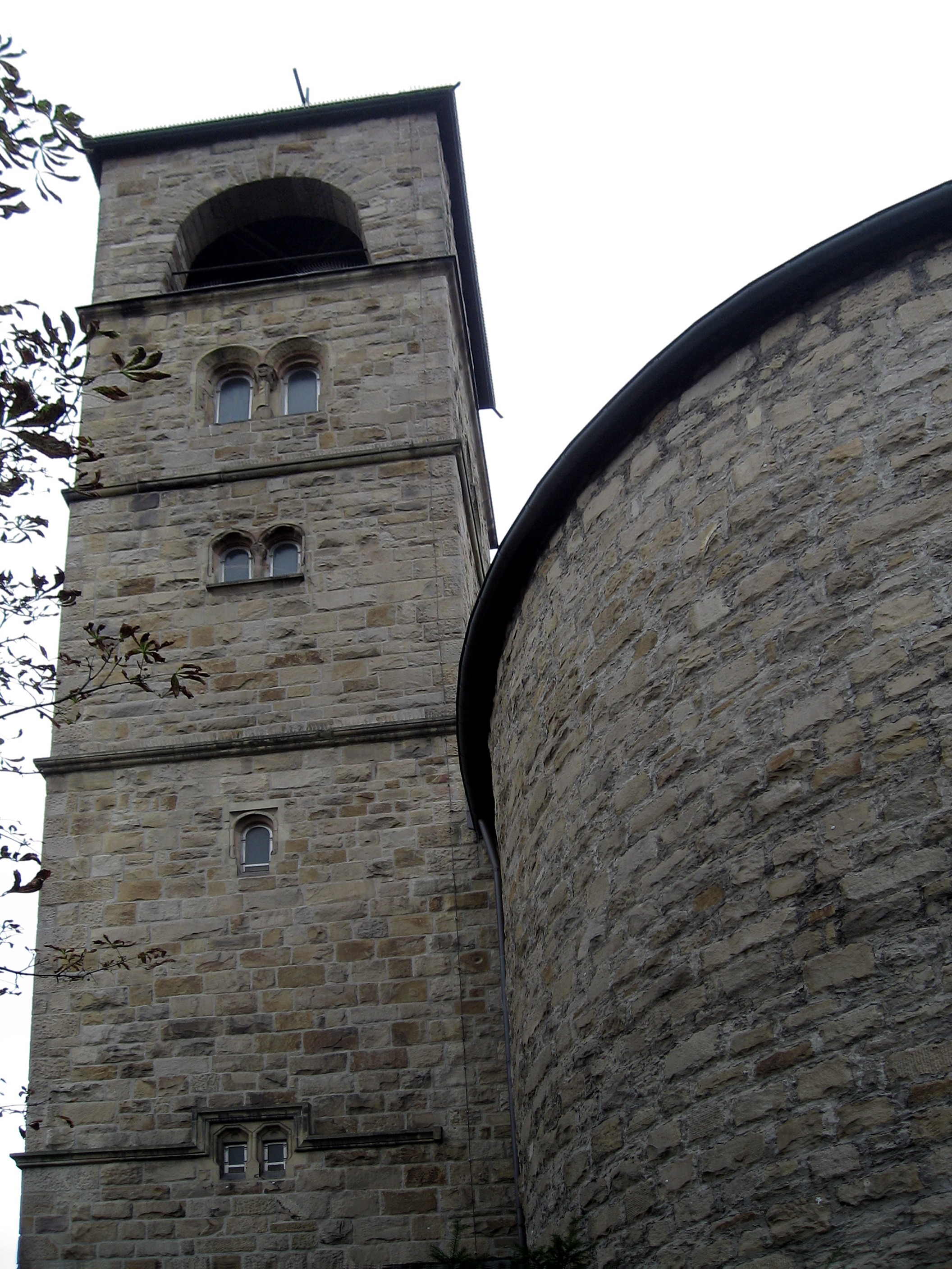 Dortmund, Bonifatius-Kirche, westlicher Hauptturm, Chorabschluss